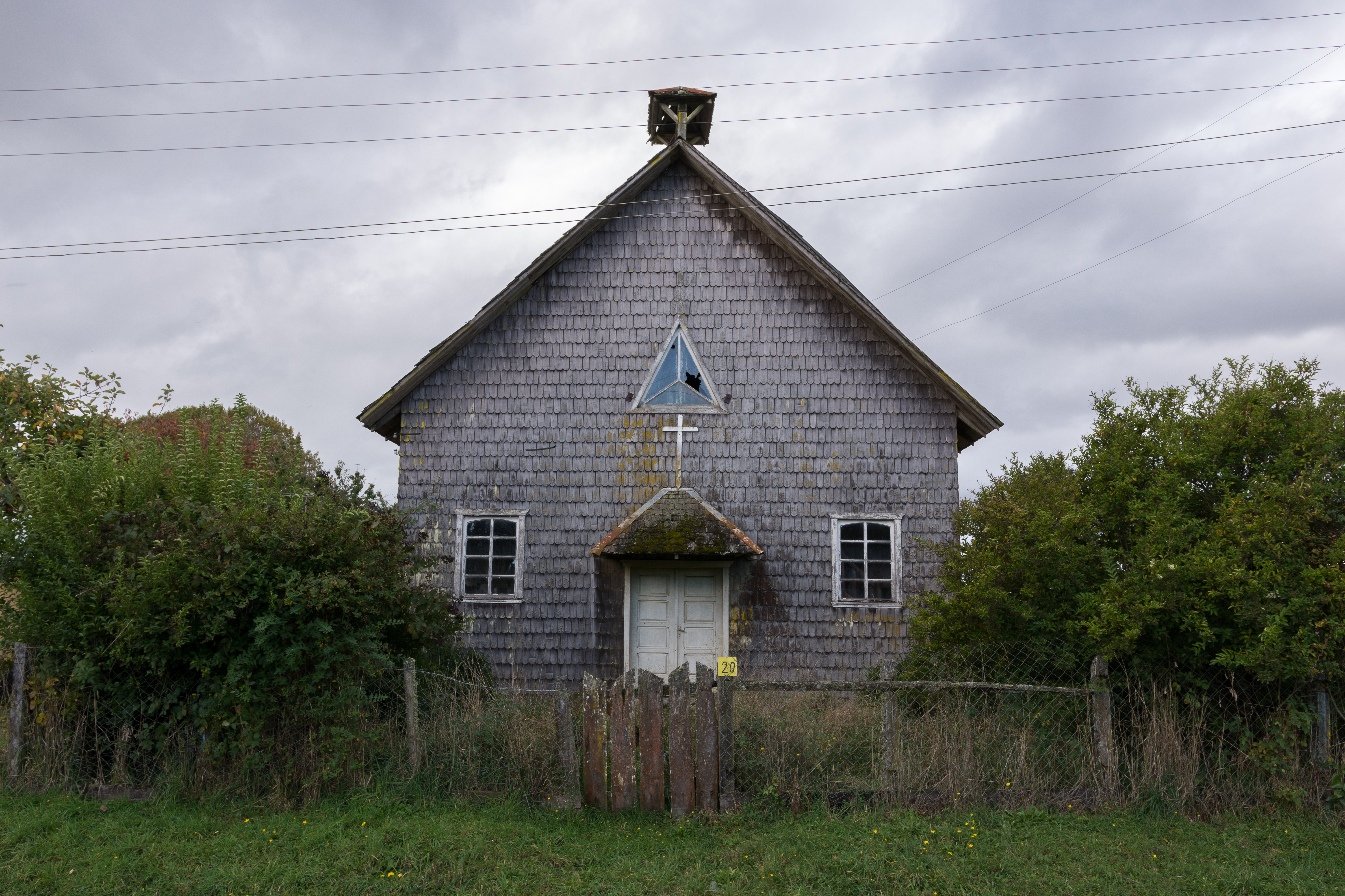 Ruta V-120